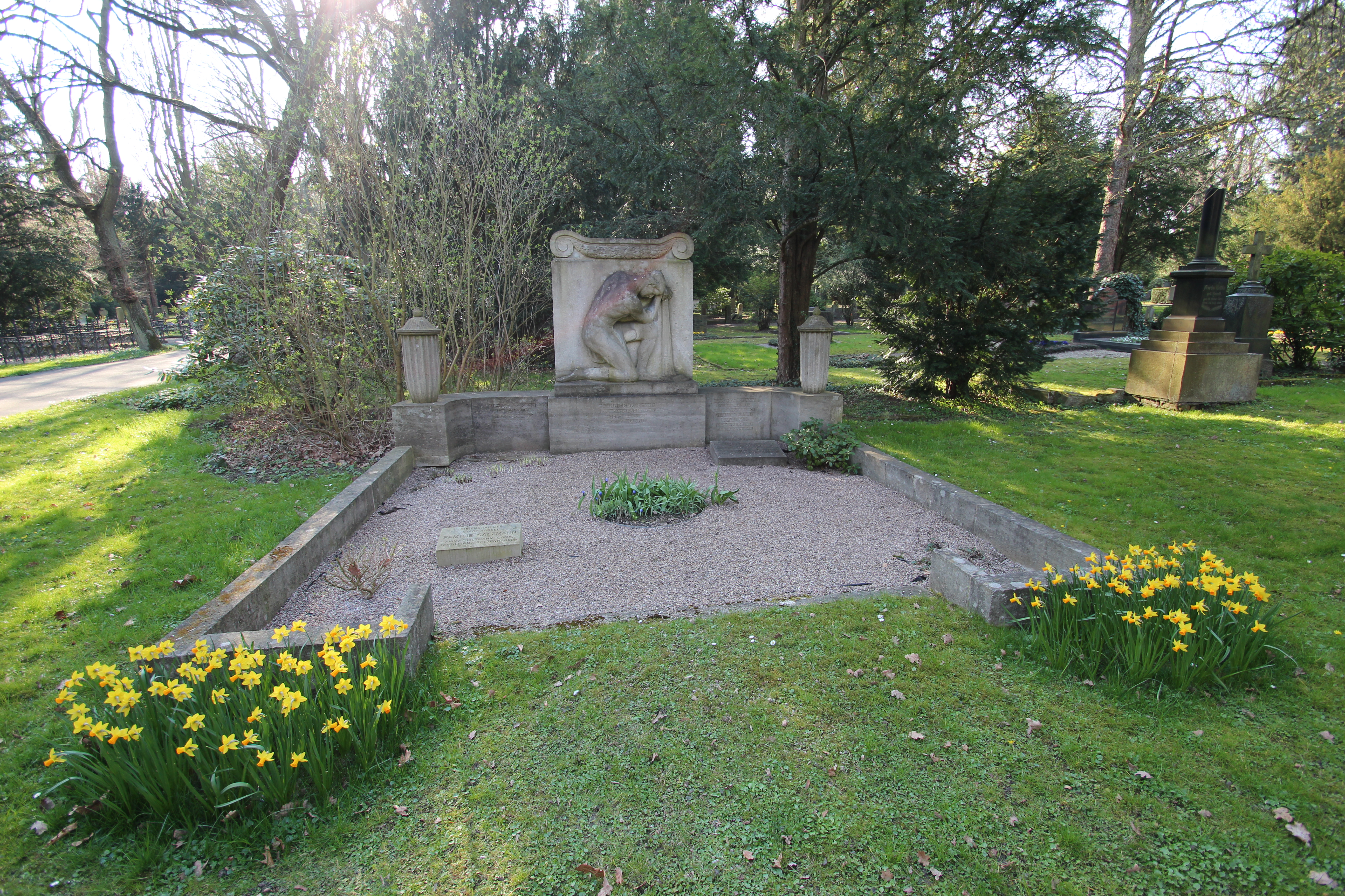 Grab von Heinrich Salzmann (Familiengrabstätte) auf dem Hauptfriedhof Kassel.